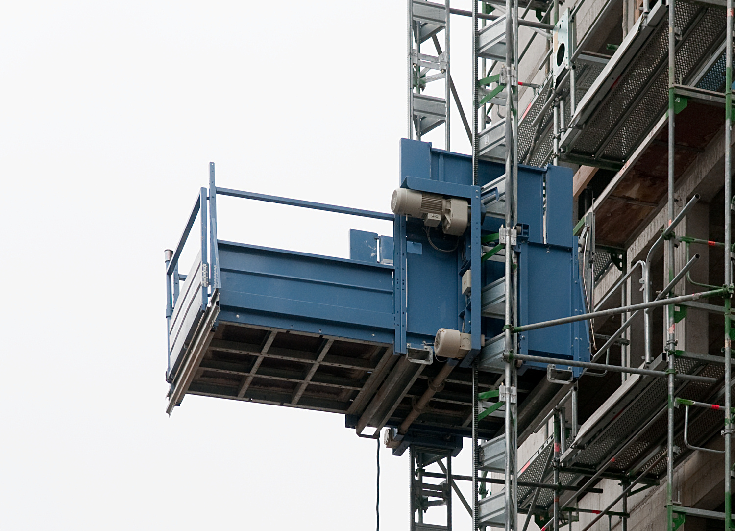 Bauaufzug nach dem Zahnstangen-/Ritzel-Prinzip